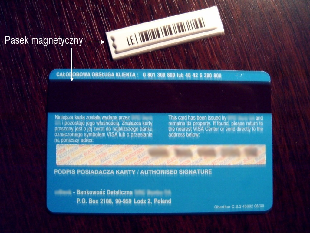 Przykłady transponderów pasywnych